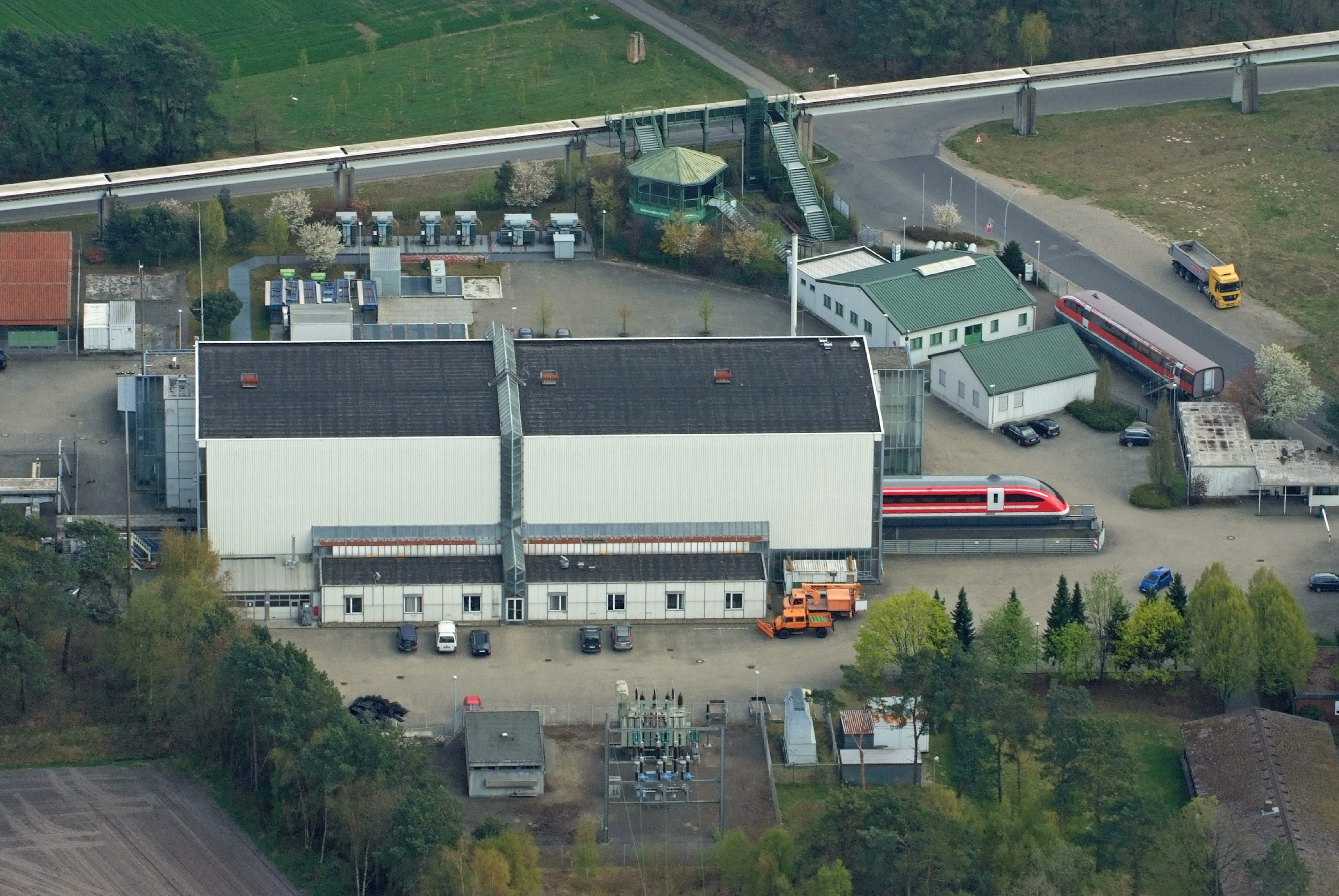 Transrapid-Versuchsanlage Emsland, Samtgemeinde Lathen / Fotoflug von Nordholz-Spieka nach Oldenburg und Papenburg